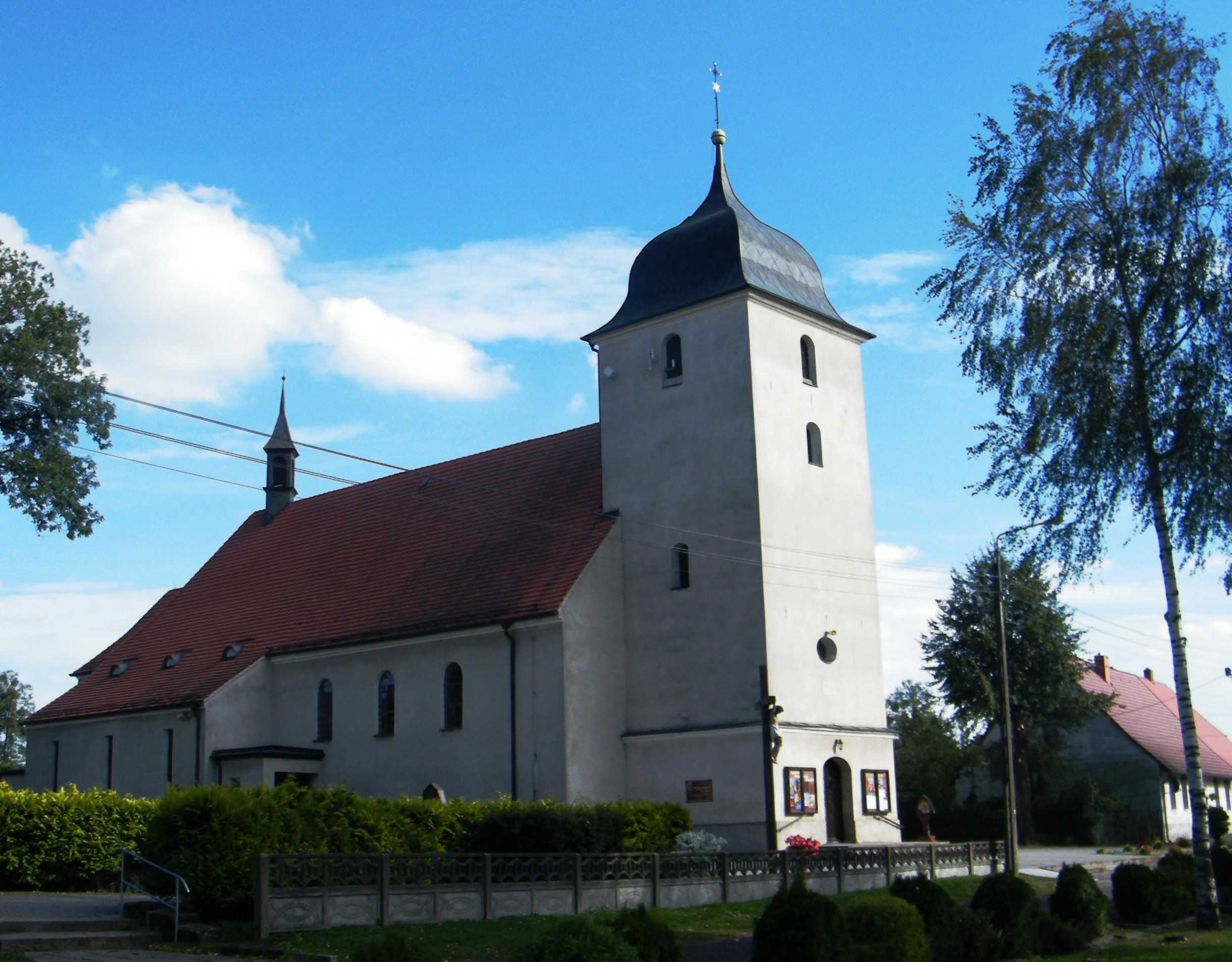 Kuniów - kościół parafialny p.w. św. Jana Chrzciciela, 1803, 1931-32 (zabytek nr 1059/65 z 26.06.1965)